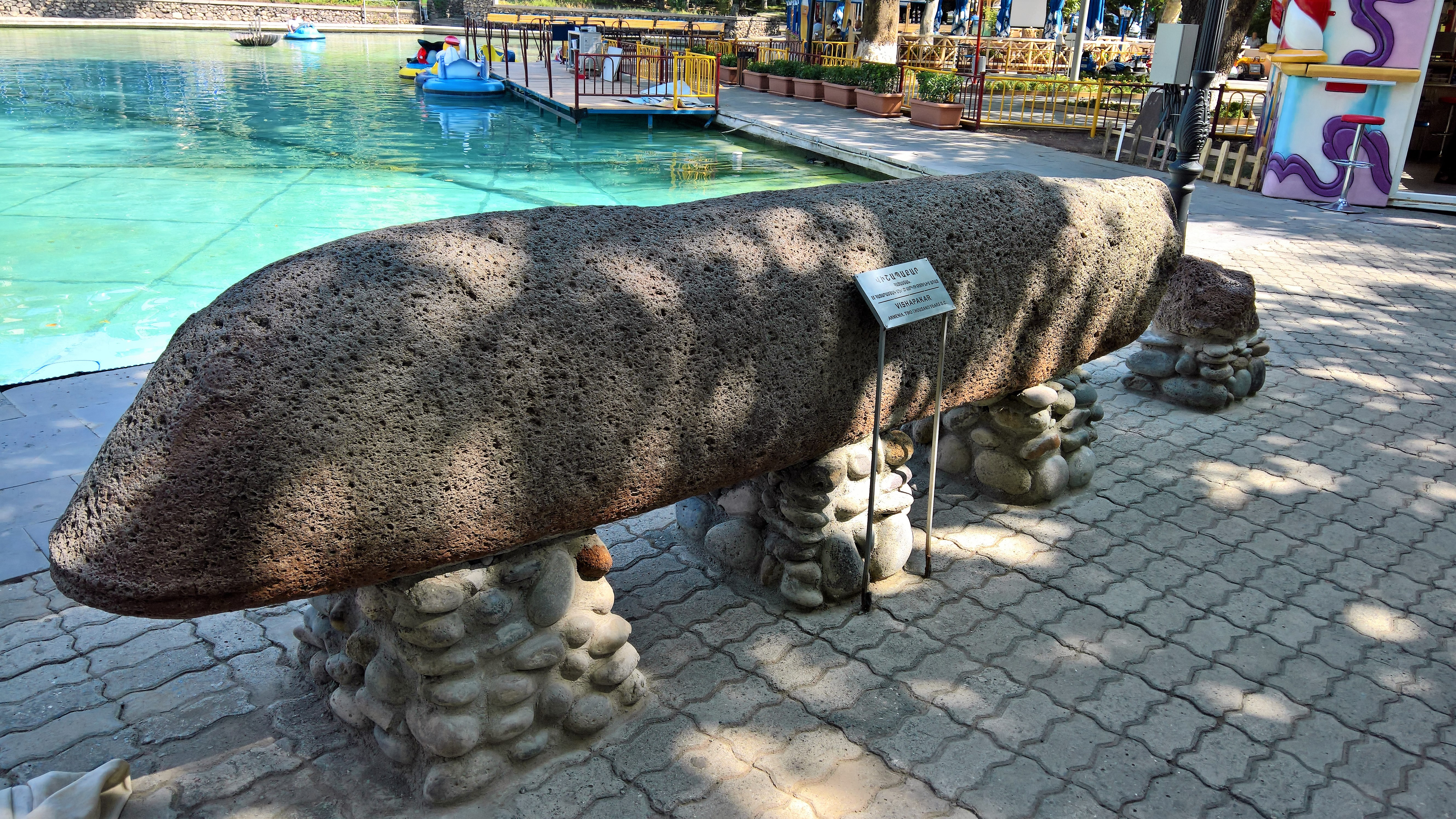 Vishapakar monoliitti Jerevanissa puistossa